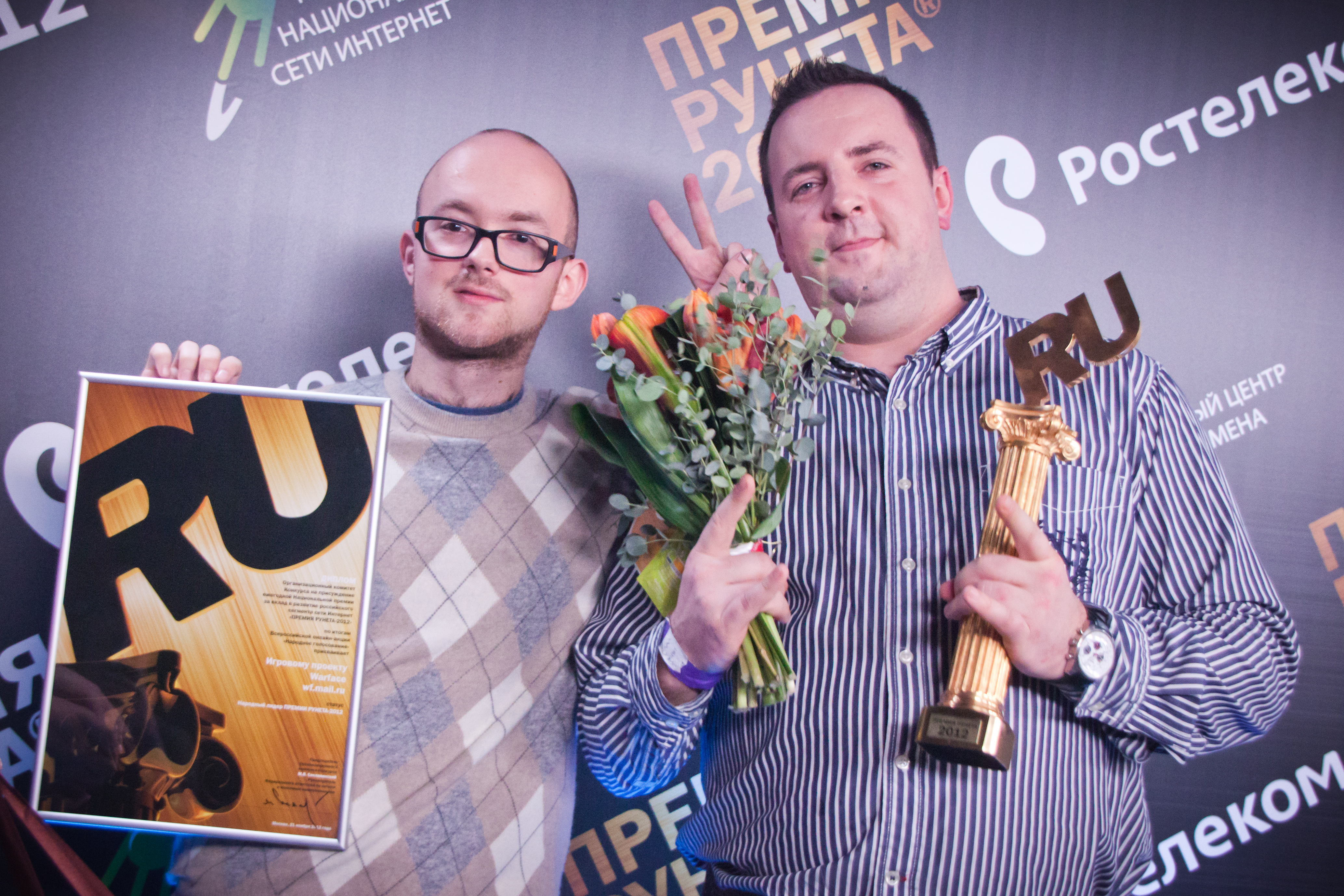 Warface - Народный лидер "Премии Рунета -2012"